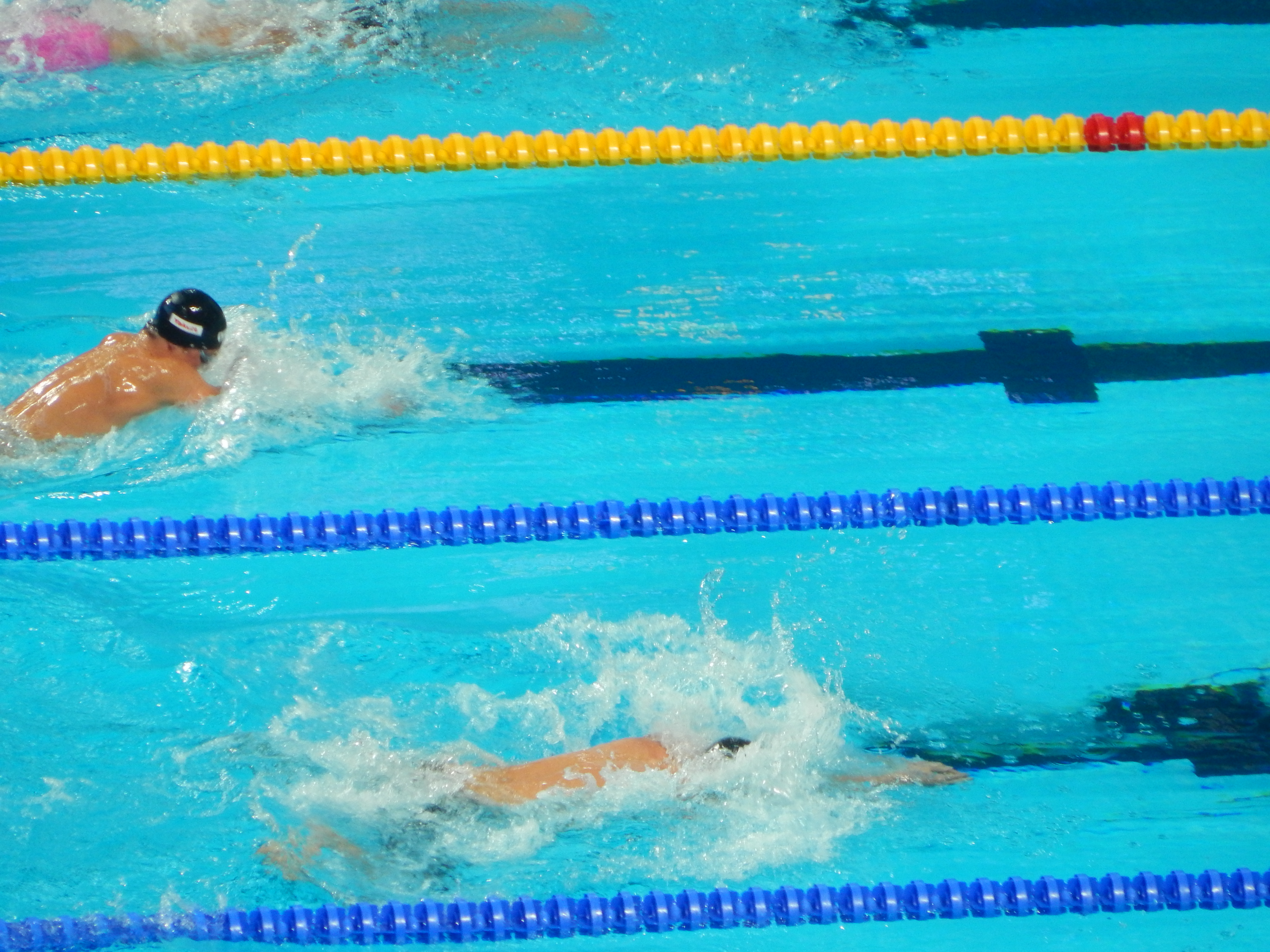 Первый полуфинал 200-метровки брассом на чемпионате мира в Казани